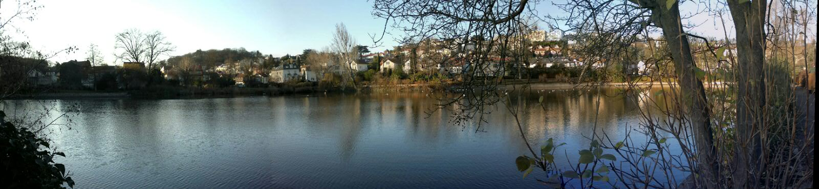 Vue de l'Etang Colbert Le Plessis Robinson depuis la berge Est